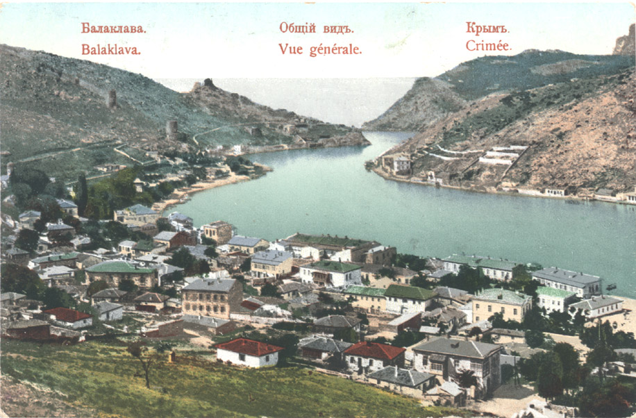 Balaklava Bay